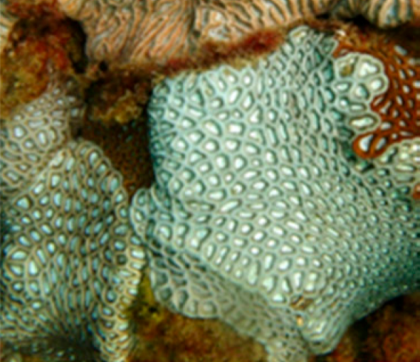 Coelastrea aspera en Minden Reef, Australia. (recorte de imagen de "Marine Biodiversity in Temperate Western Australia: Multi-Taxon Surveys of Minden and Roe Reefs". Zoe Richards et al. 2013-14 )